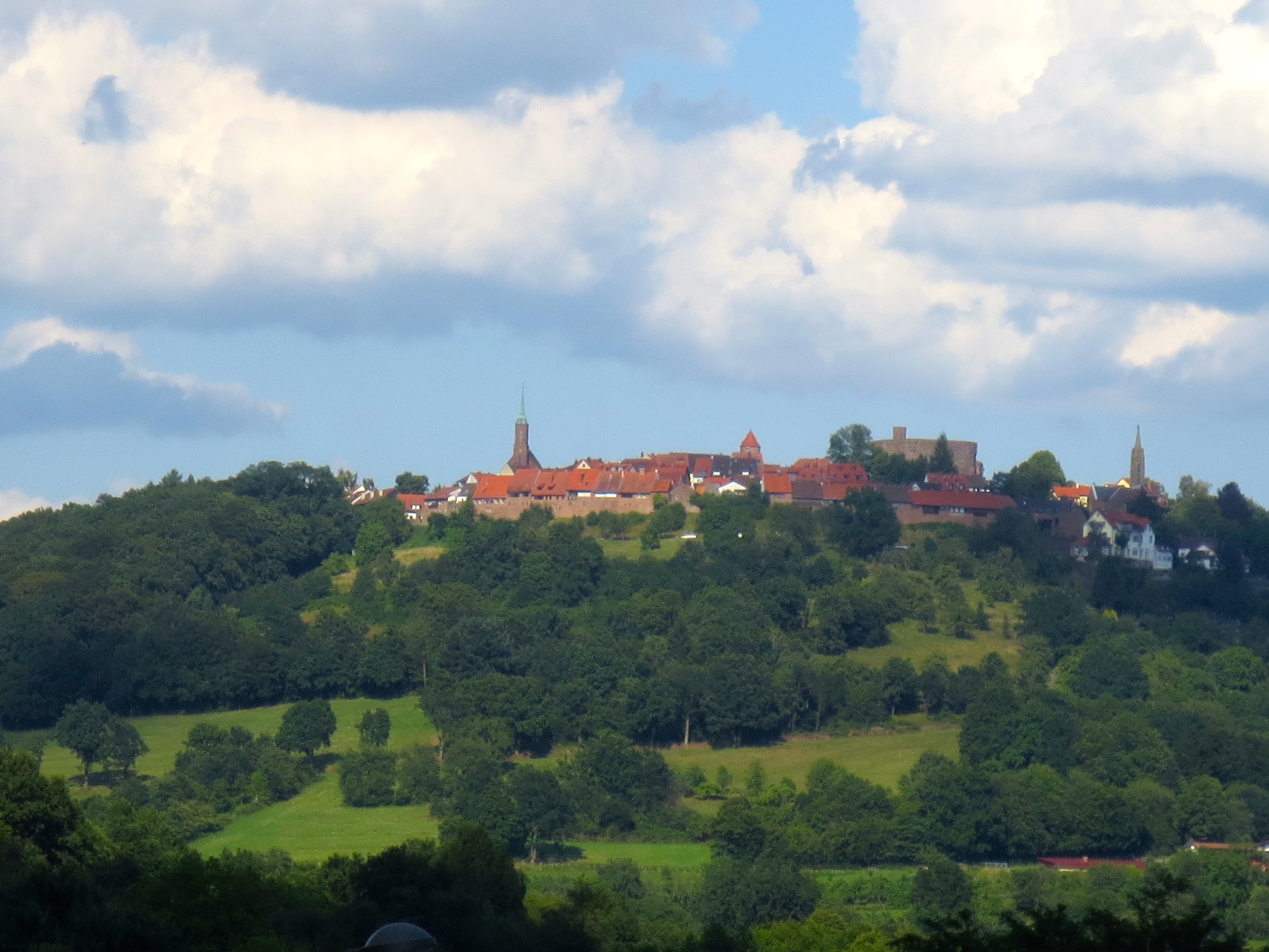 Der Dilsberg aus dem RNV Linienbus in Neckargemünd durch die Fensterscheibe fotogrfiert